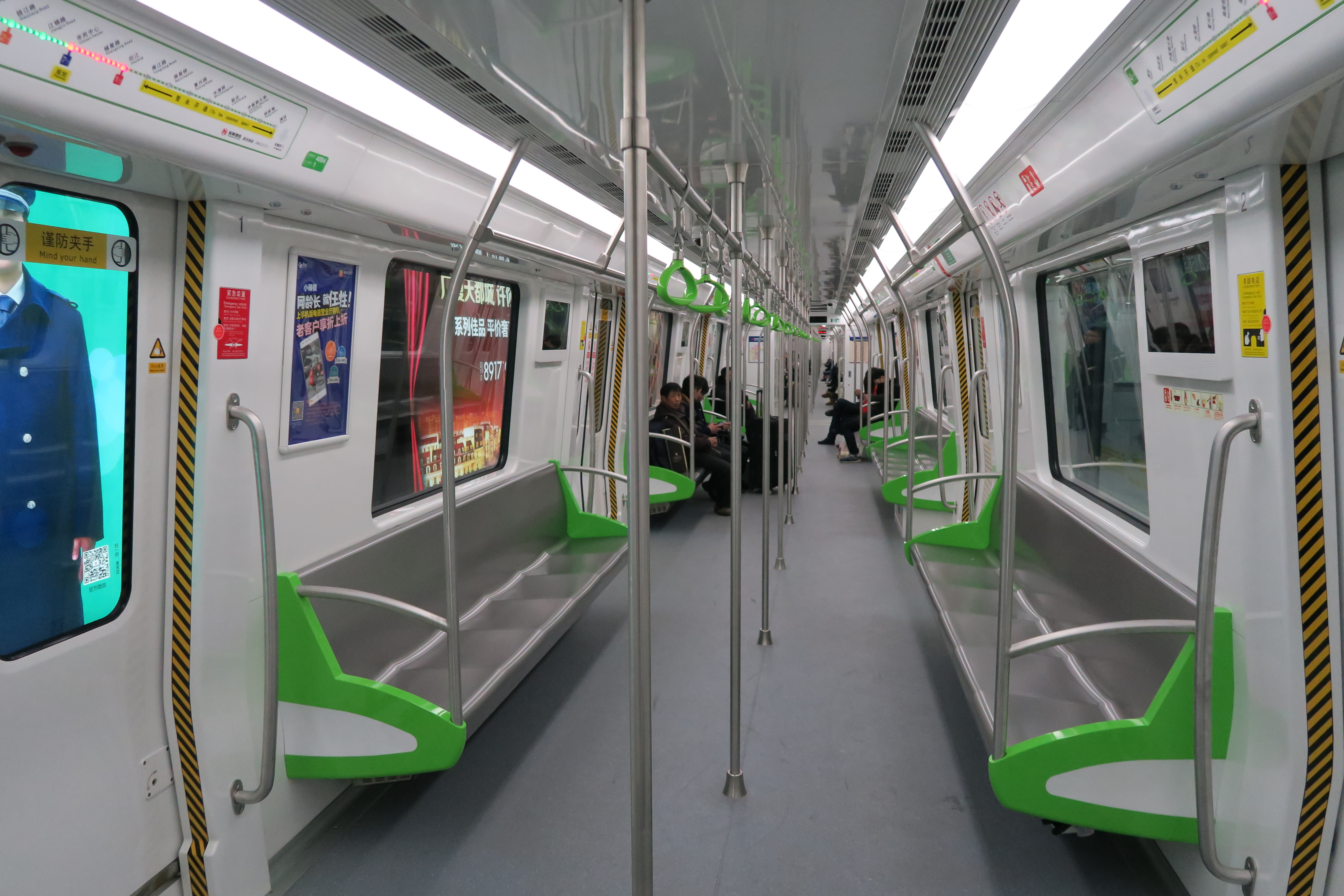 杭州地铁4号线列车内部